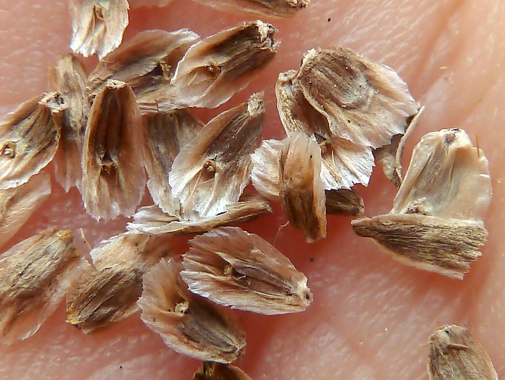 Scolymus hispanicus (Cardillo, Tagarnina) . Cipselas maduras sueltas aún rodeadas de sus páleas aladas membranosas; se notan restos del vilano de finas aristas barbeladas en el escote de las páleas. - Prolongación calle José Quinto, Albatera (Alicante, España).